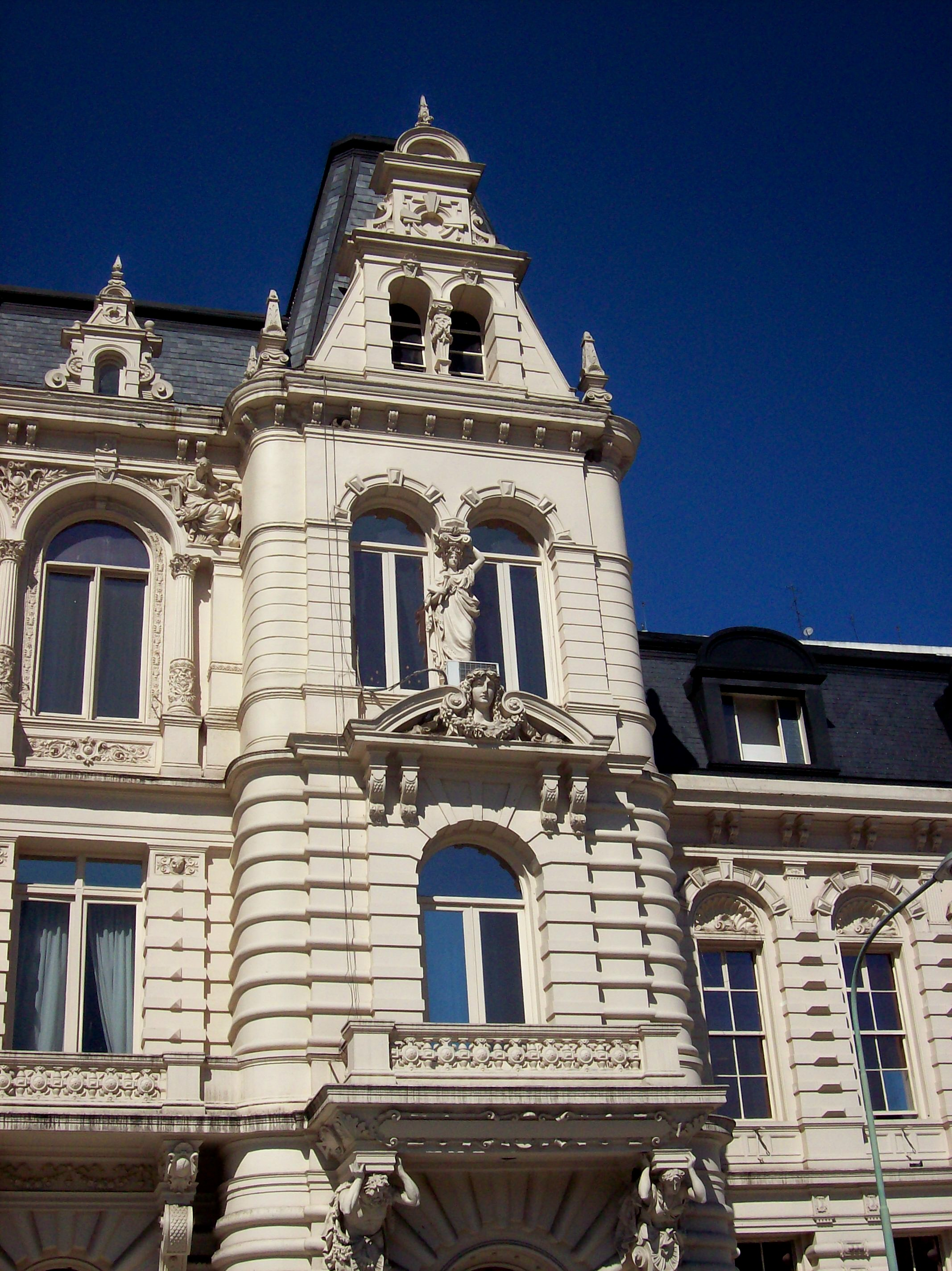 Torre de entrada del Palacio Pizzurno (Ministerio de Educación), en Recoleta, Buenos Aires.